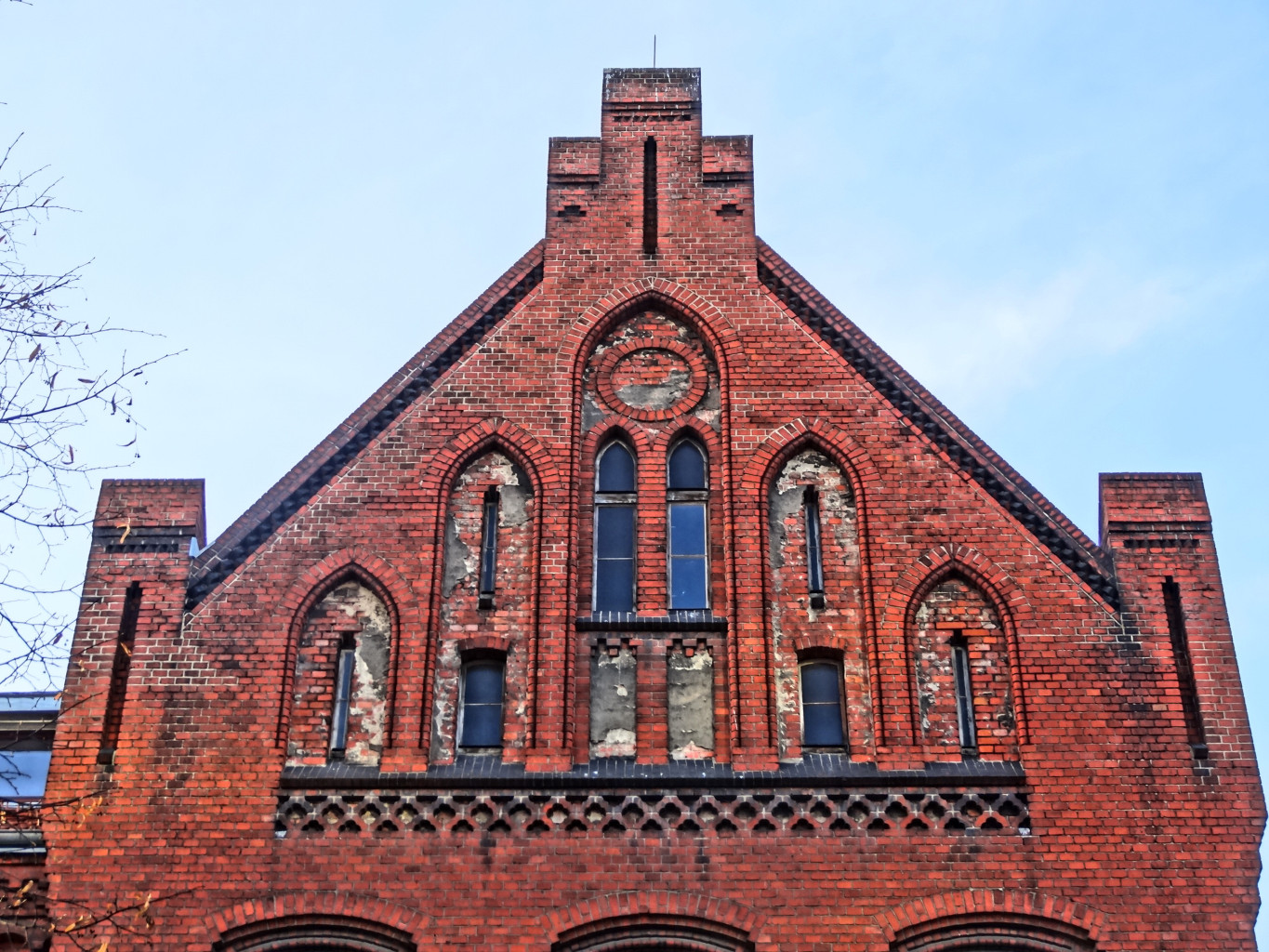 Budynek Schroniska Młodzieżowego w Bydgoszczy przy ul. Sowińskiego (dawna szkoła powszechna zbud. 1896-1898)